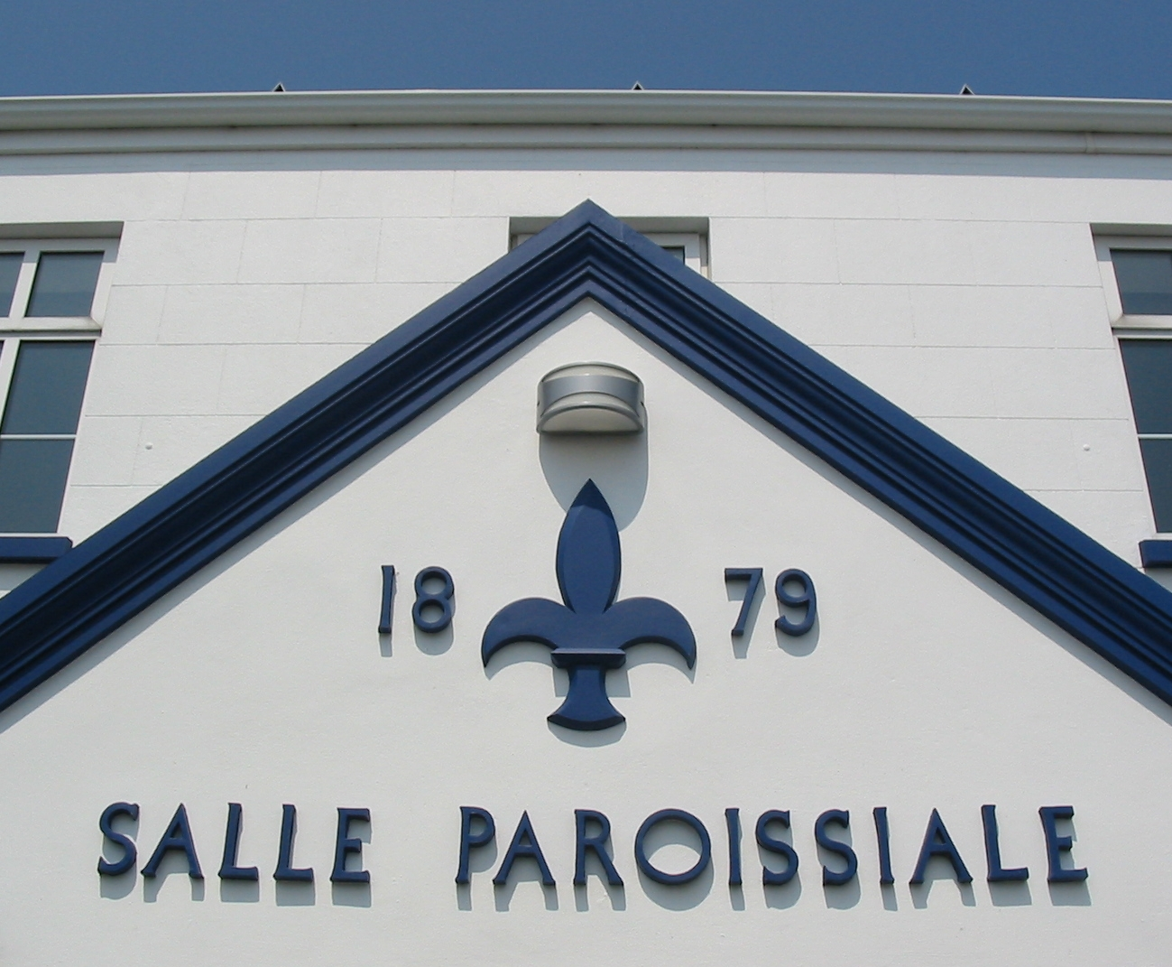 Nrf: Salle Pârouaîssiale dé Sainte Mathie, Jèrri - 1879